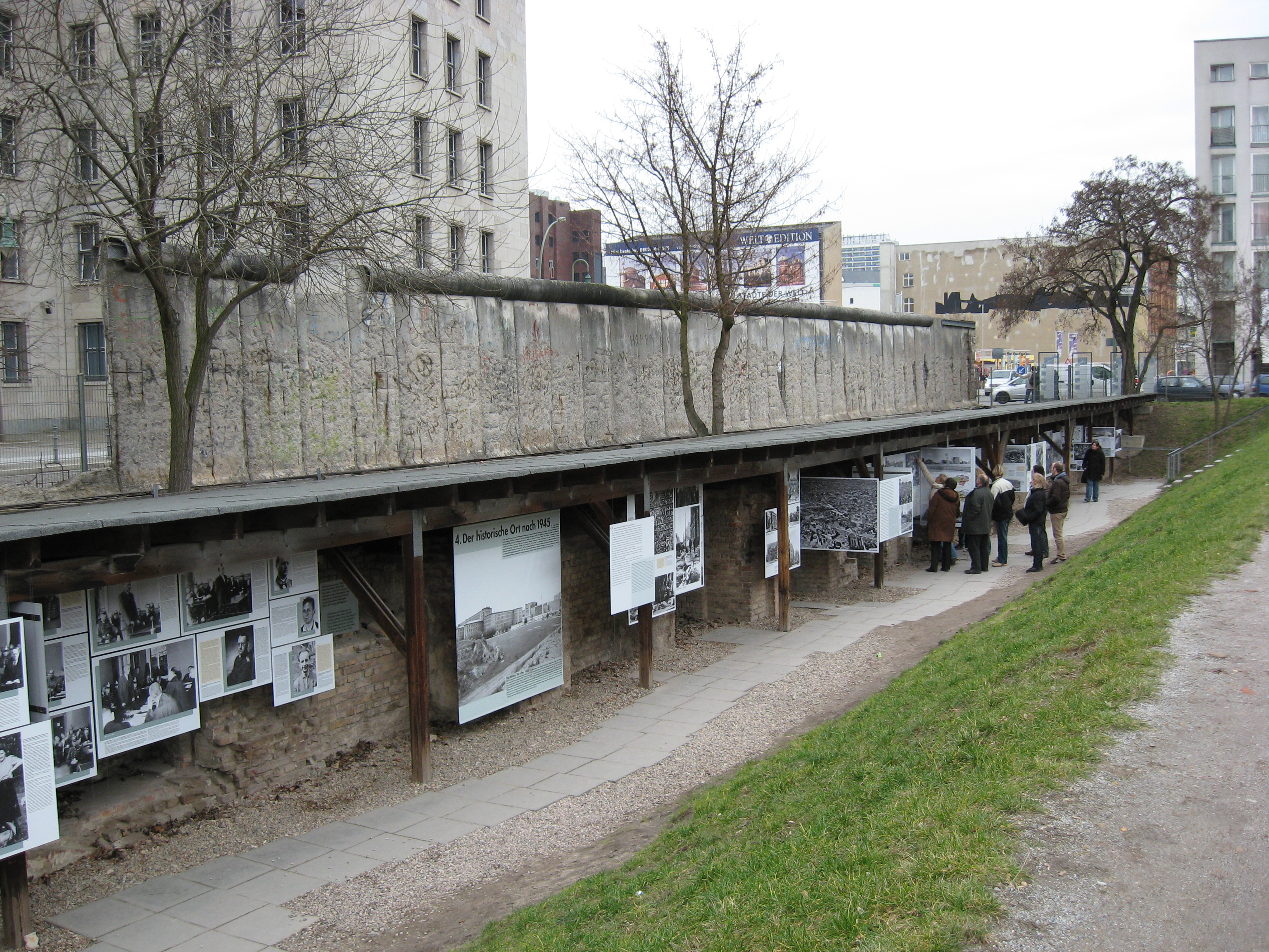 Bild der Ausstellung "Topographie des Terrors" in Berlin